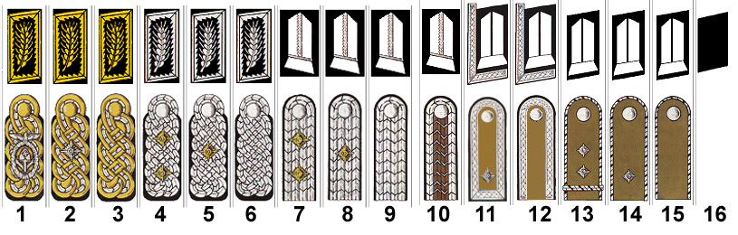 Bildbeschreibun der deutschen de-wp: Rangabzeichen des Reichsarbeitsdienstes – Abbildungen von Kragenspiegeln und Schulterklappen (unvollständig). Die Dienstgrad bzw. Ränge der Angehörigen des Reichsarbeitsdienstes waren absteigend: Generale 01 Reichsarbeitsführer (Generlafeldmarschall, OF-10 Bild fehlt – Generaloberstfeldmeister (Generaloberst OF-9); wie Nr. 3 Generalarbeitsführer, jedoch mit drei Sternen Bild fehlt – Generalfeldmeister (General der Waffengattung OF-8); wie NR. 3 Generalarbeitsführer, jedoch mit zwei Sternen 02 Obergeneralarbeitsführer (Generalleutnant, OF-7) 03 Generalarbeitsführer (Generalmajor, OF-6) Offiziere 04 Oberstarbeitsführer (Oberst, OF-5) 05 Oberarbeitsführer (Oberstleutnant, OF-4) 06 Arbeitsführer (Major, OF-3) 07 Oberstfeldmeister (Hauptmann, OF-2) 08 Oberfeldmeister (Leutnant, OF-1a) 09 Feldmeister (Leutnant, OF-1b) Unterführer 10 Unterfeldmeister (oberhalb Stabsfeldwebel, OR-8a) 11 Obertruppführer (Feldwebel, OR-6) 12 Truppführer (Unteroffizier, OR-5) Mannschaften 13 Untertruppführer (Stabsgefreiter, OR-4) Bild fehlt – Hauptvormann (Hauptgefreiter Lw, OR-3); wie Nr. 13 mit den 2 Sternen, jedoch ohne Querstreifen 14 Obervormann (Obergefreiter, OR-2) 15 Vormann (Gefreiter, OR-2) 16 Arbeitsmann (Soldat, OR-1)